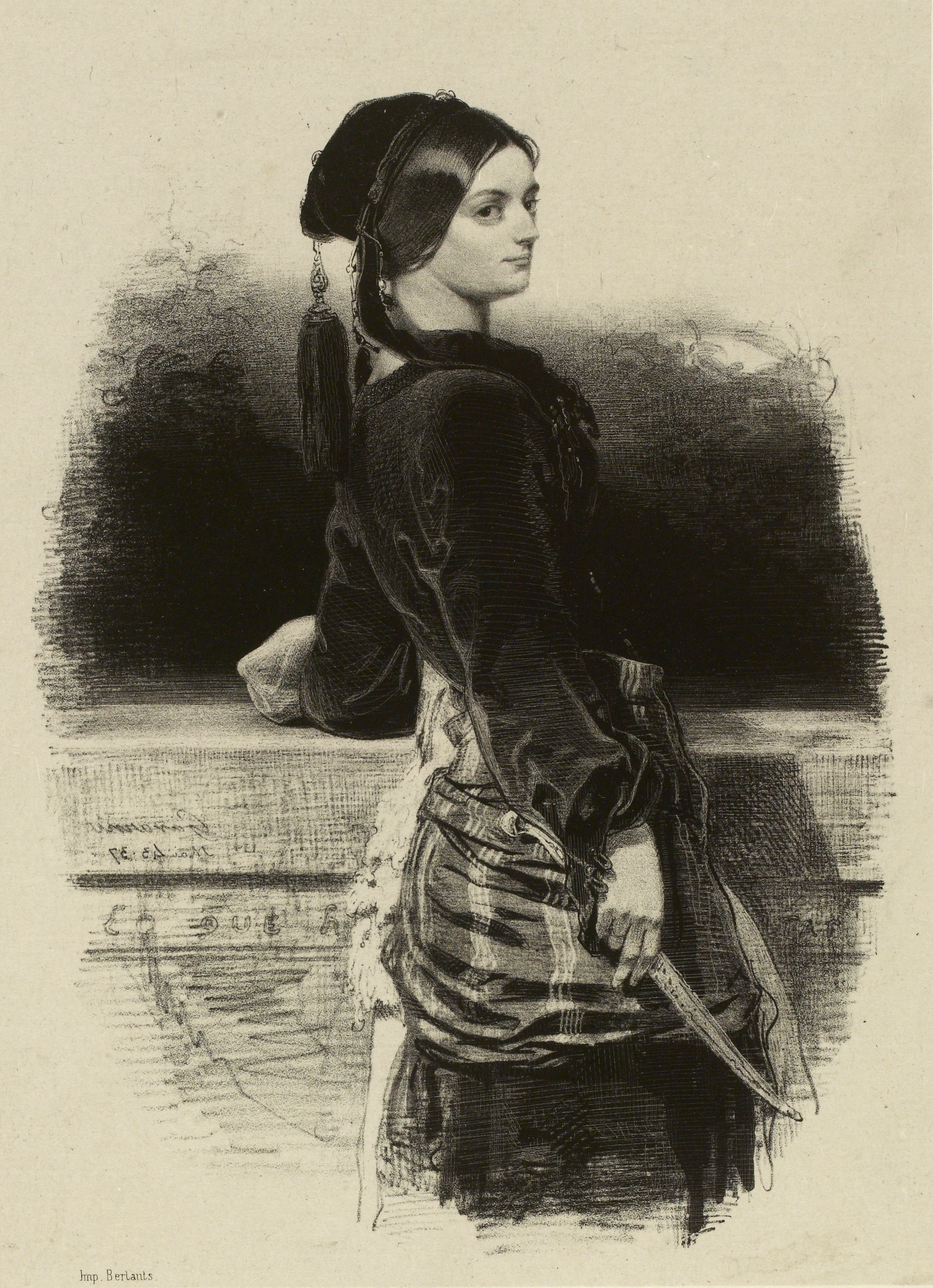 Гюльнара (мадемуазель. Мелани Вальдор) из балета «Корсар» - литография работы Поля Гаварни